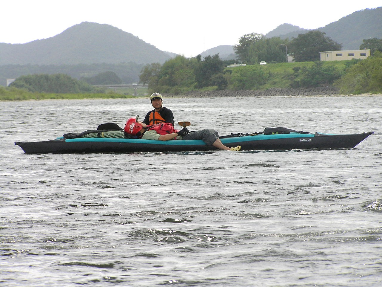 川旅（リバーツーリング）加古川編